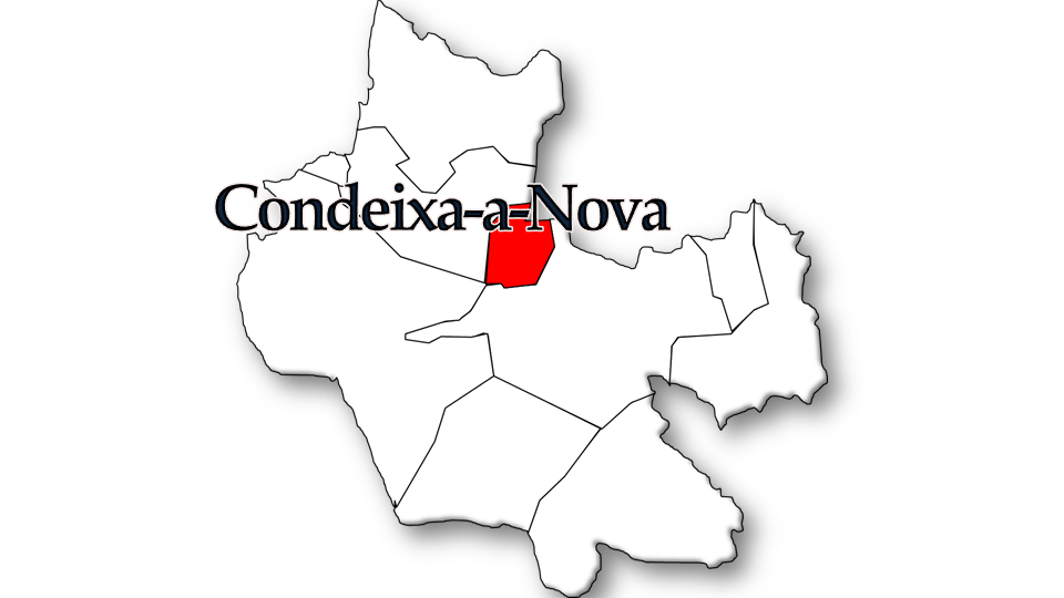 População